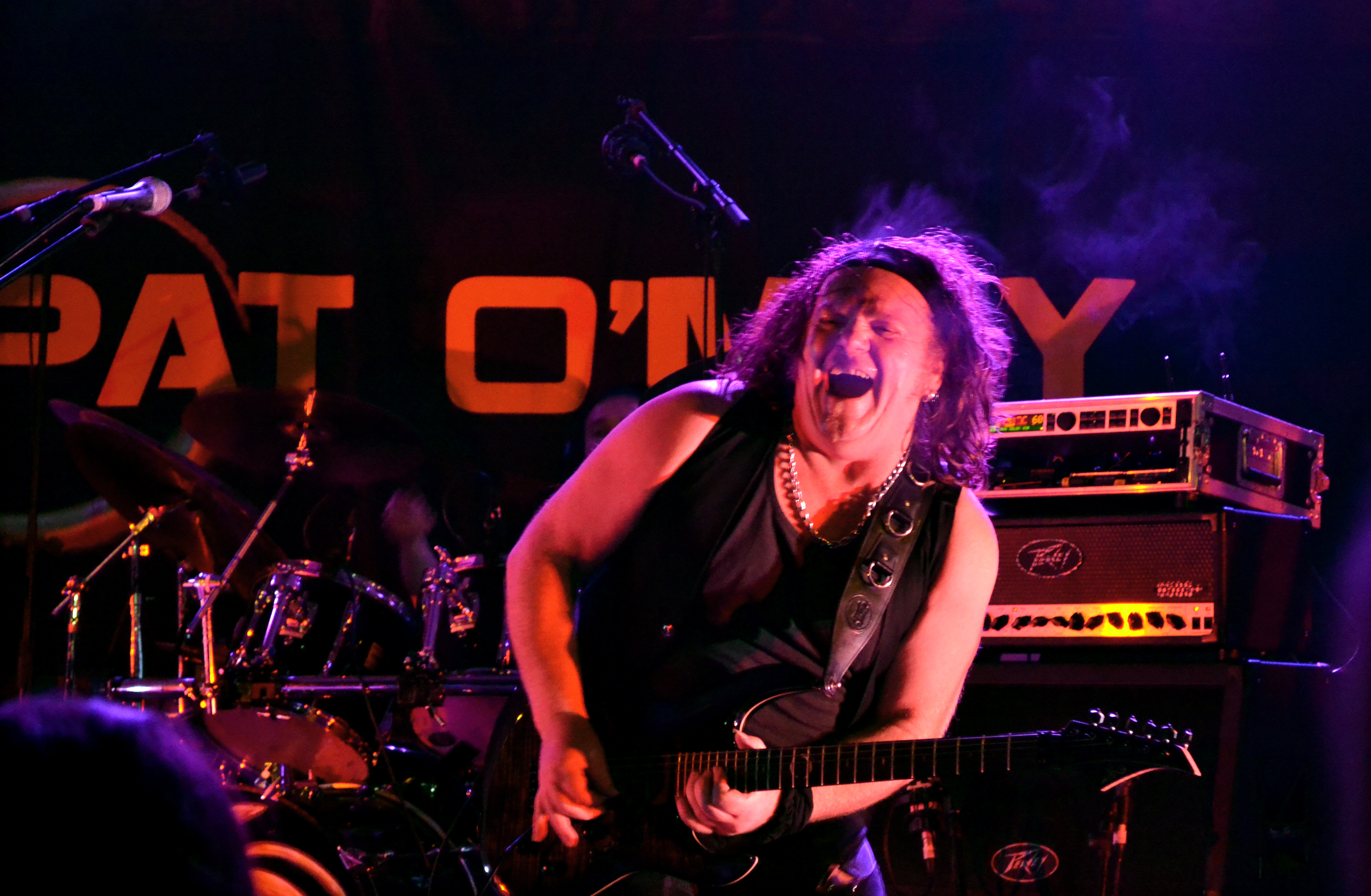 Concert rock celtique de Pat O'May au Festy'Jeanne, festival des Légendes Celtiques, à Plouégat-Moysan le 4 mai 2013.